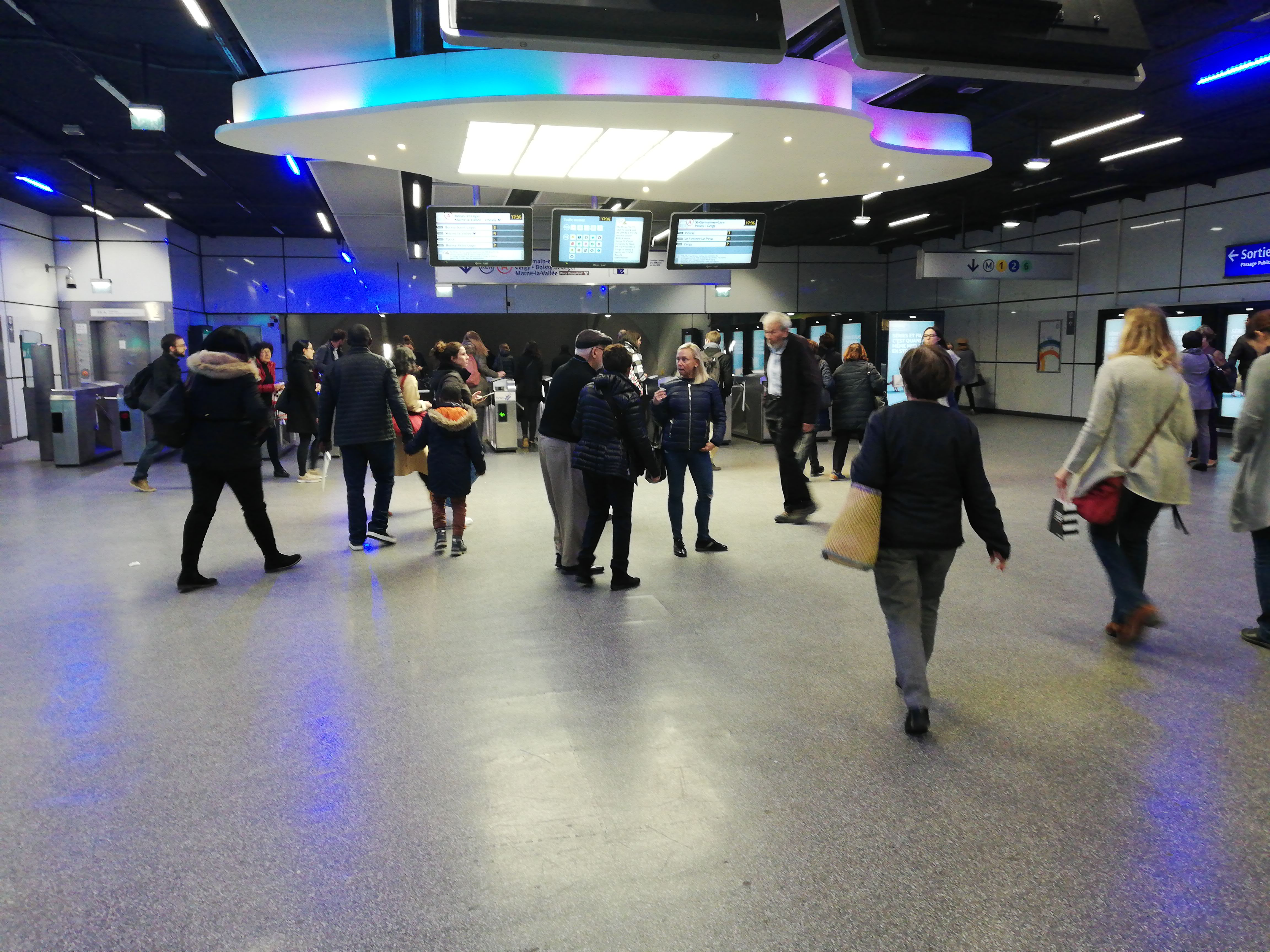 Salle des échanges de la gare de Charles de Gaulle - Étoile, en 2018.